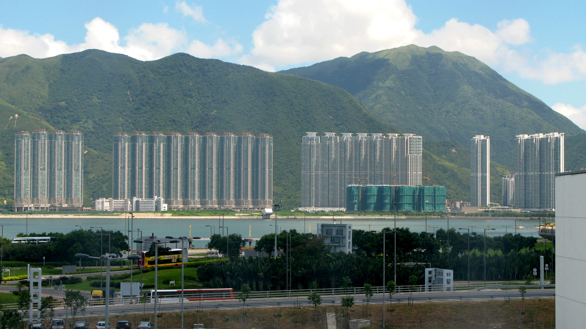 Tung Chung Buildings in 2007